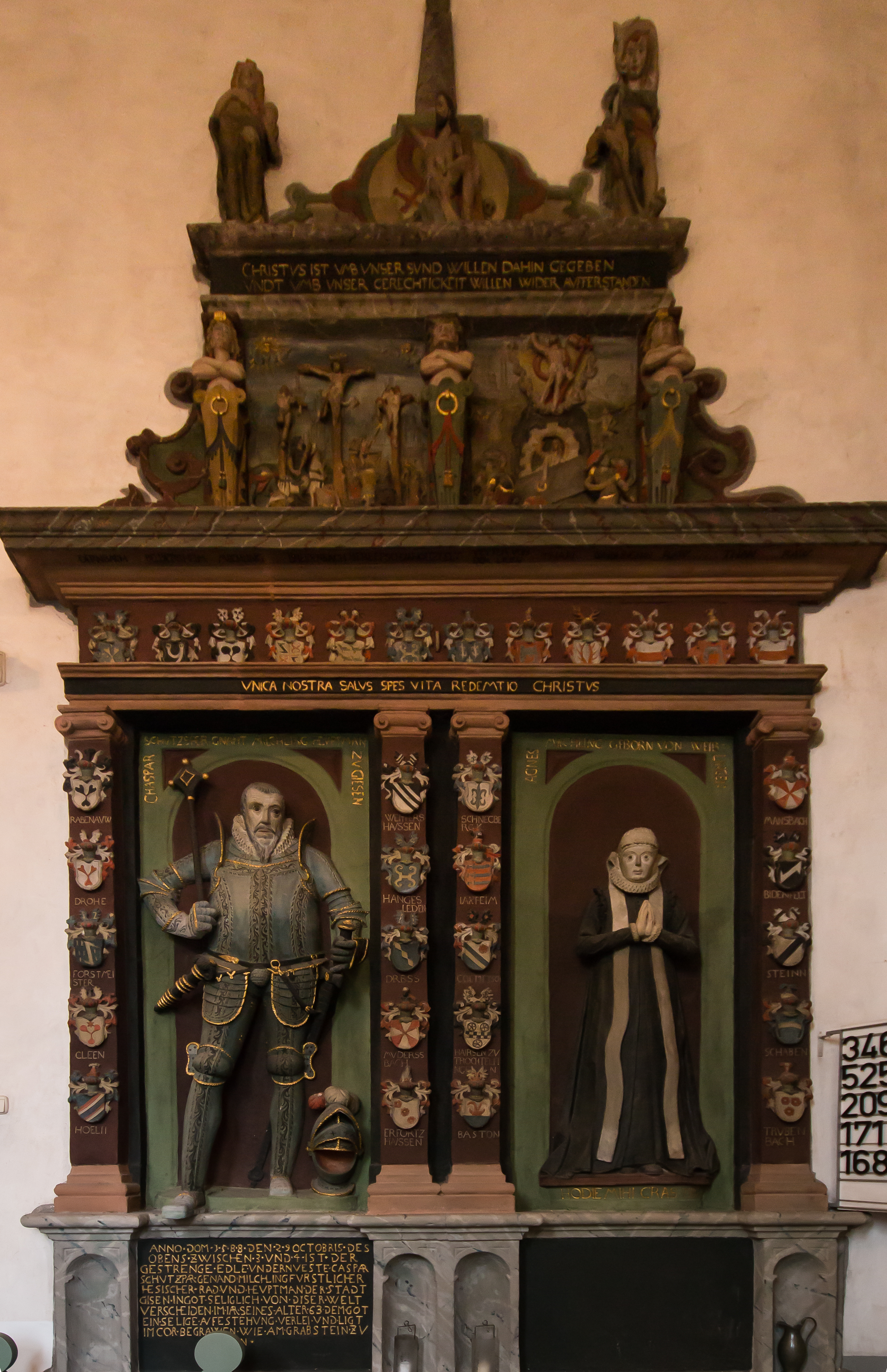 Angebracht an der Nordwand des Langhauses der evangelischen Kirche Treis an der Lumda.